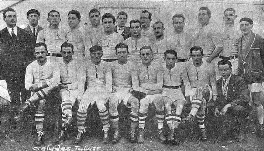 La Section Paloise, championne de France de rugby 1927-1928.